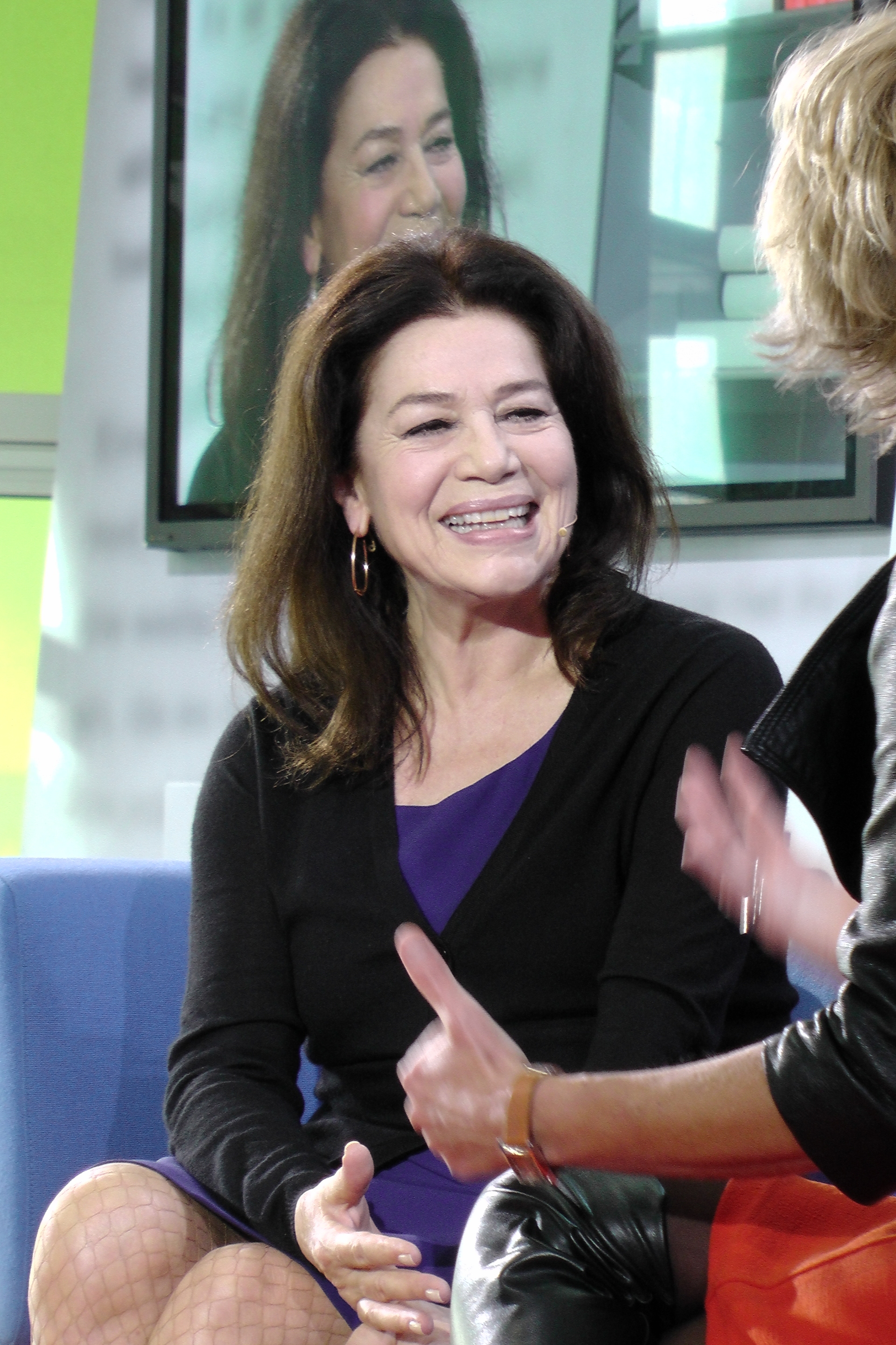 Hannelore Elsner. Dieses Fotos dürfen Sie honorarfrei nutzen, wenn Sie folgenden credit beachten: Copyright: Das blaue Sofa / Club Bertelsmann.